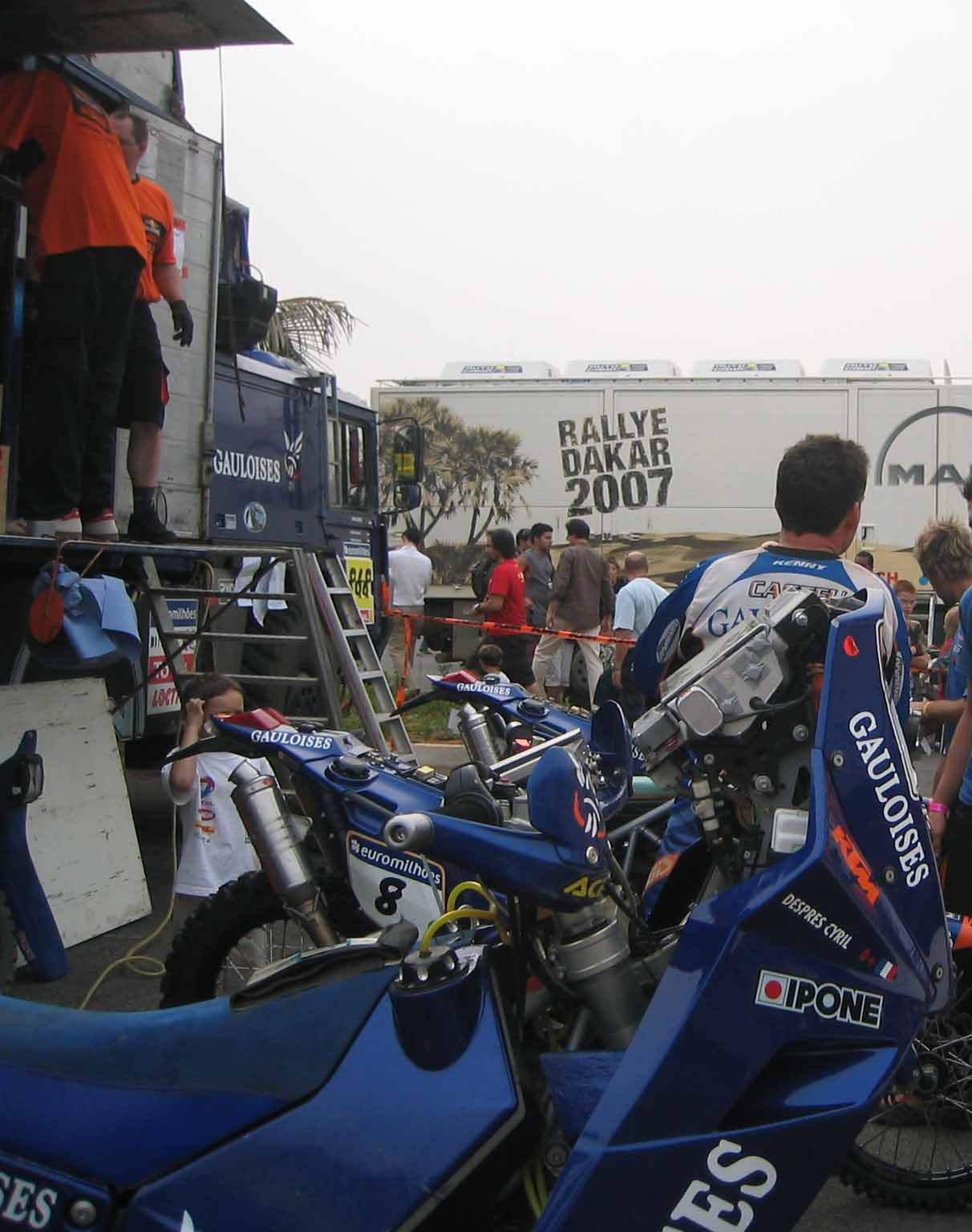 La moto KTM du vainqueur Cyril Despres à l'arrivée du Rallye Lisboa Dakar 2007 (Hôtel Méridien de Dakar le samedi)